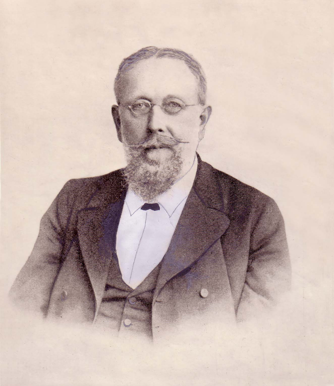 Fotografie von Heinrich von Achenbach